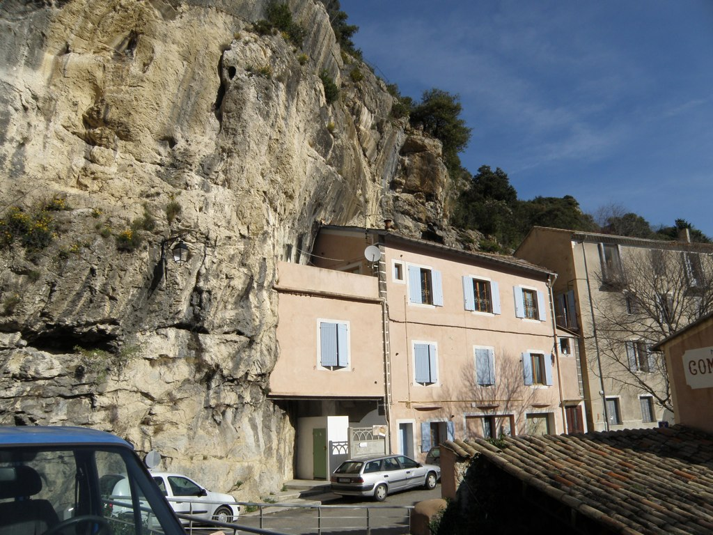 rue de la Maladrerie à Nyons